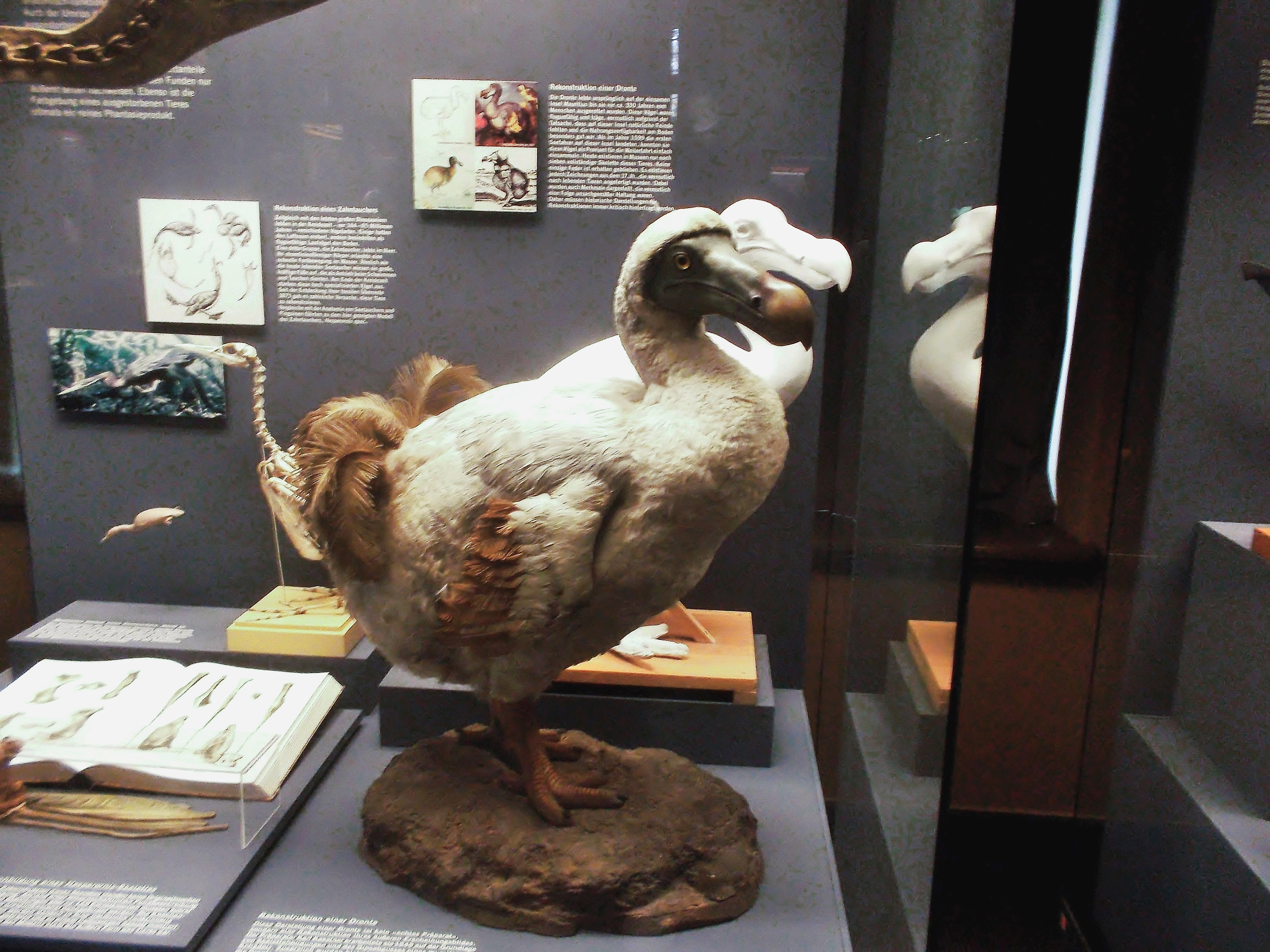 eine ausgestopfte Dronte (Raphus cucullatus) im Museum für Naturkunde, Berlin